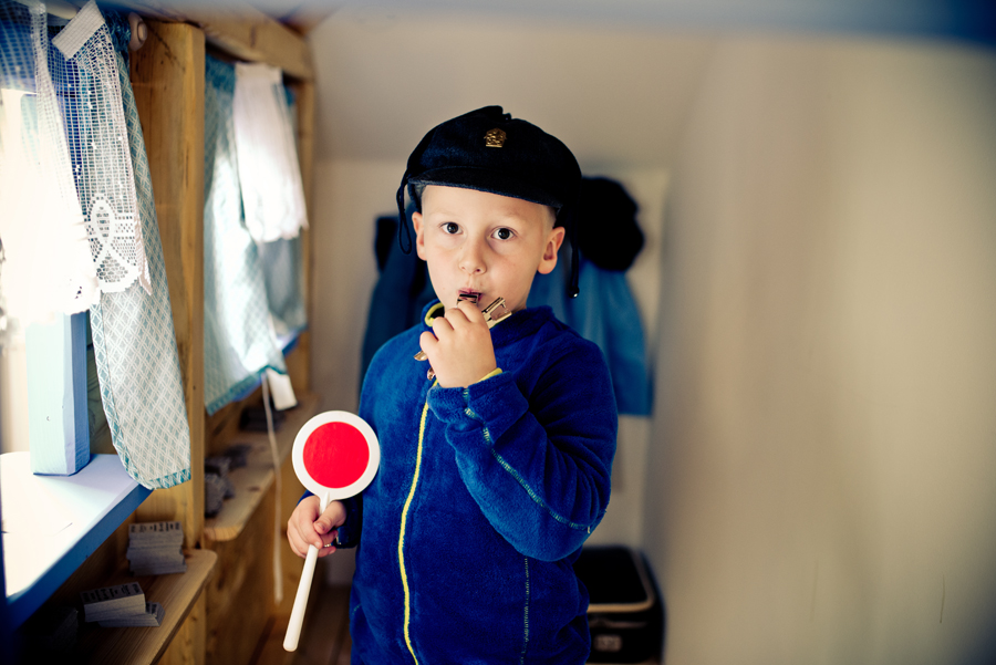 Děti si zahrají také na nádraží Bílý potok Aloise Nebela